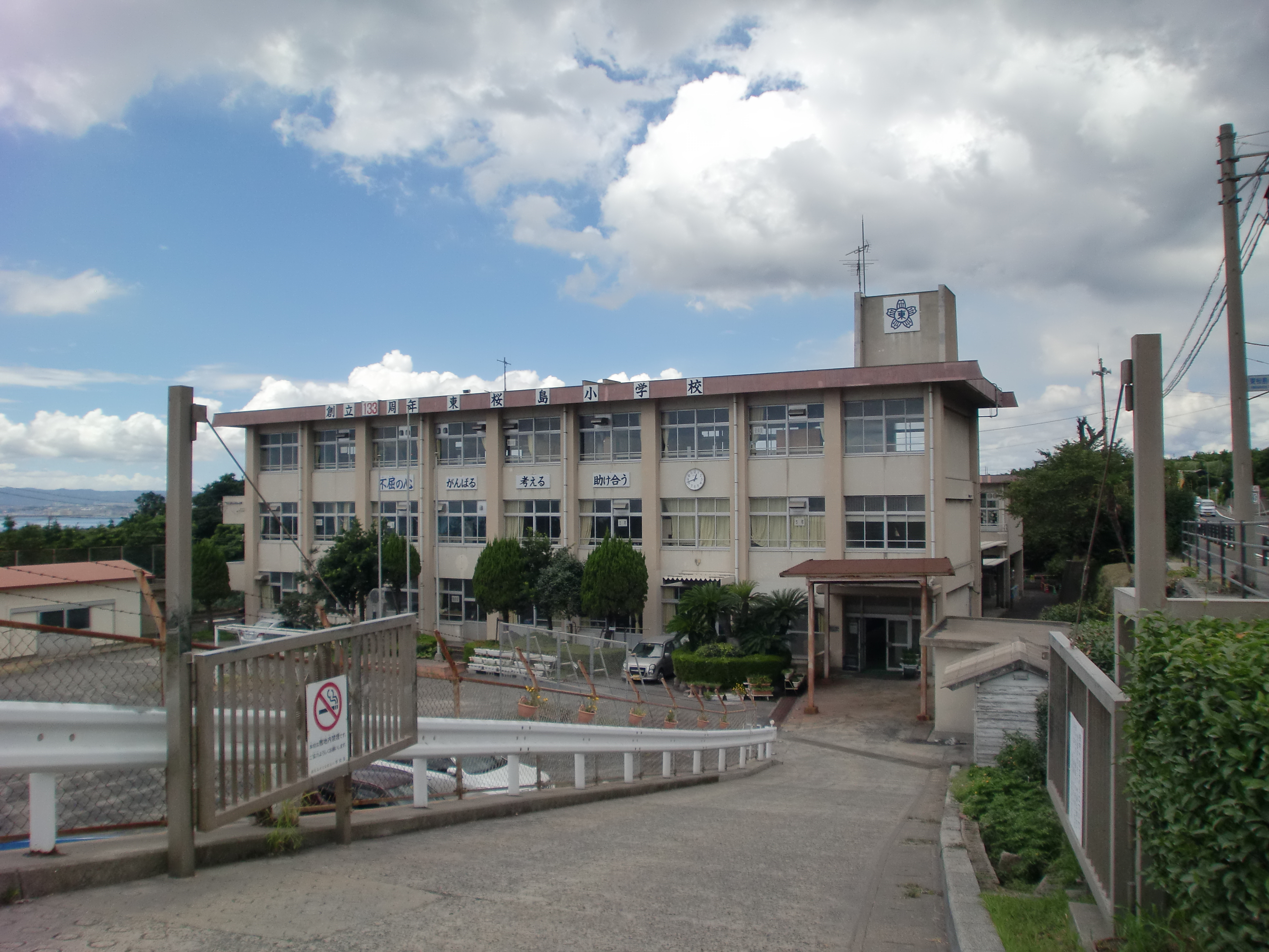 鹿児島市立東桜島小学校の外観。